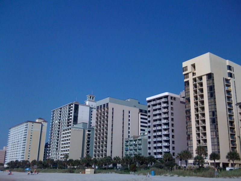 Phil